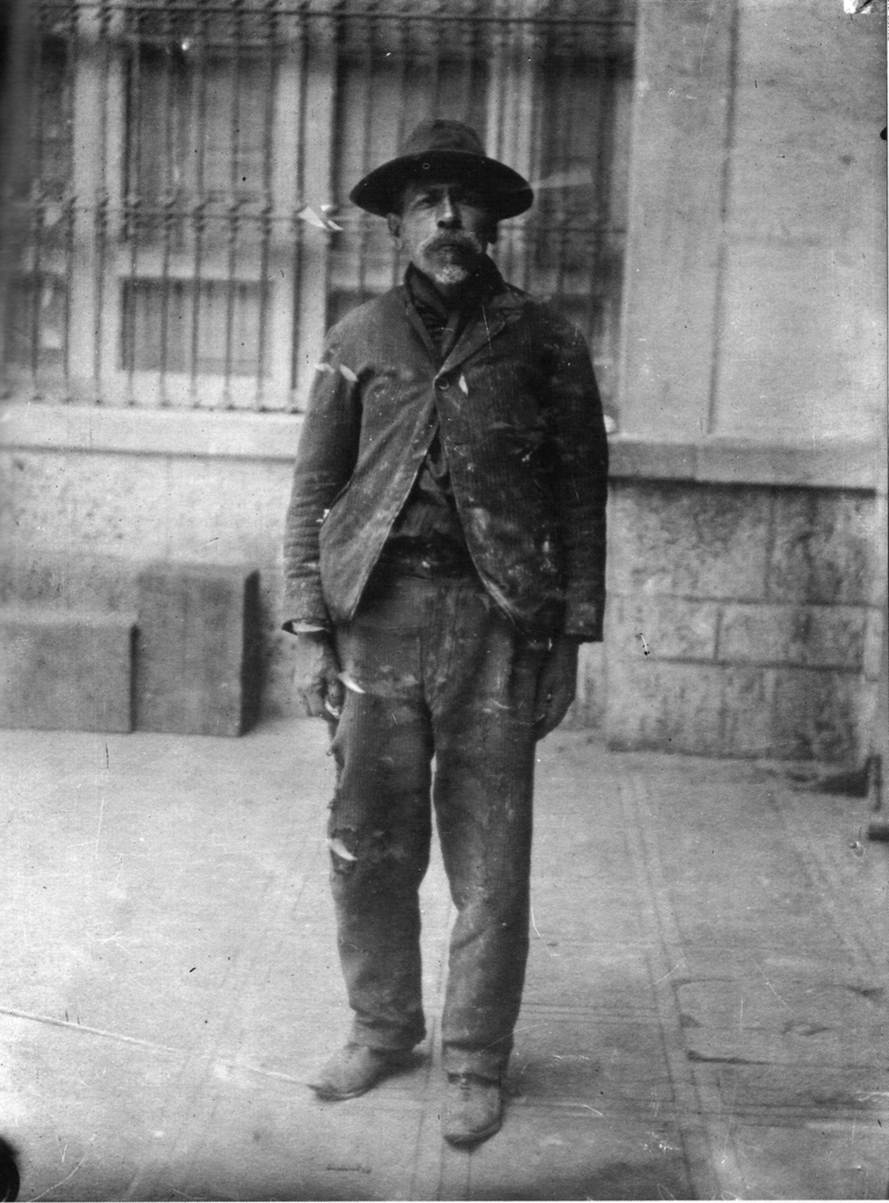 Francisco Guerrero en la prisión de Lecumberri.